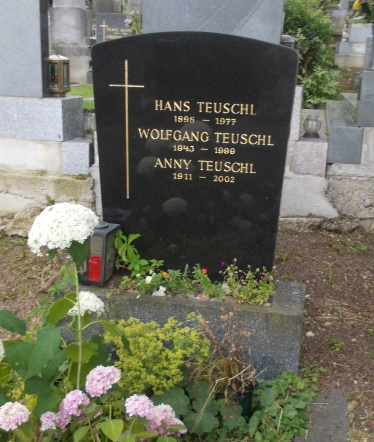 Wolfgang Teuschl Neustifter Friedhof (E-6-4)